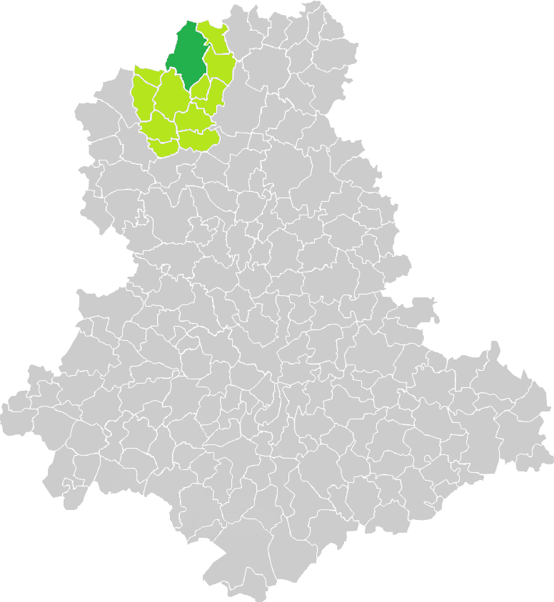 Carte de situation de la commune d'Azat-le-Ris (en vert foncé) dans le votre Canton (en vert clair) sur une carte des communes de la Haute-Vienne